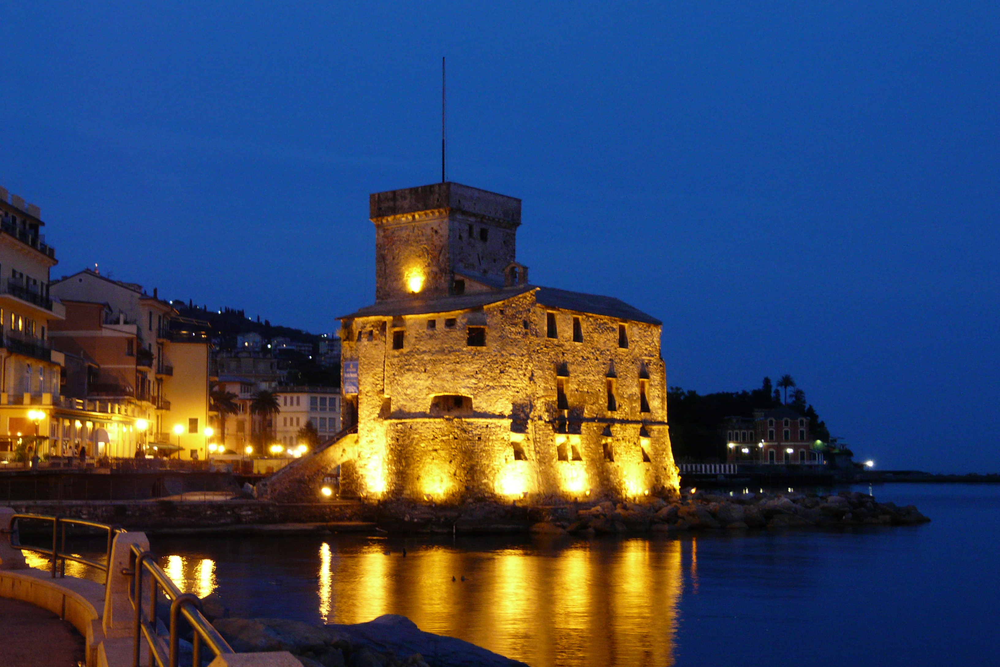 Castello di Rapallo, Liguria, Italia